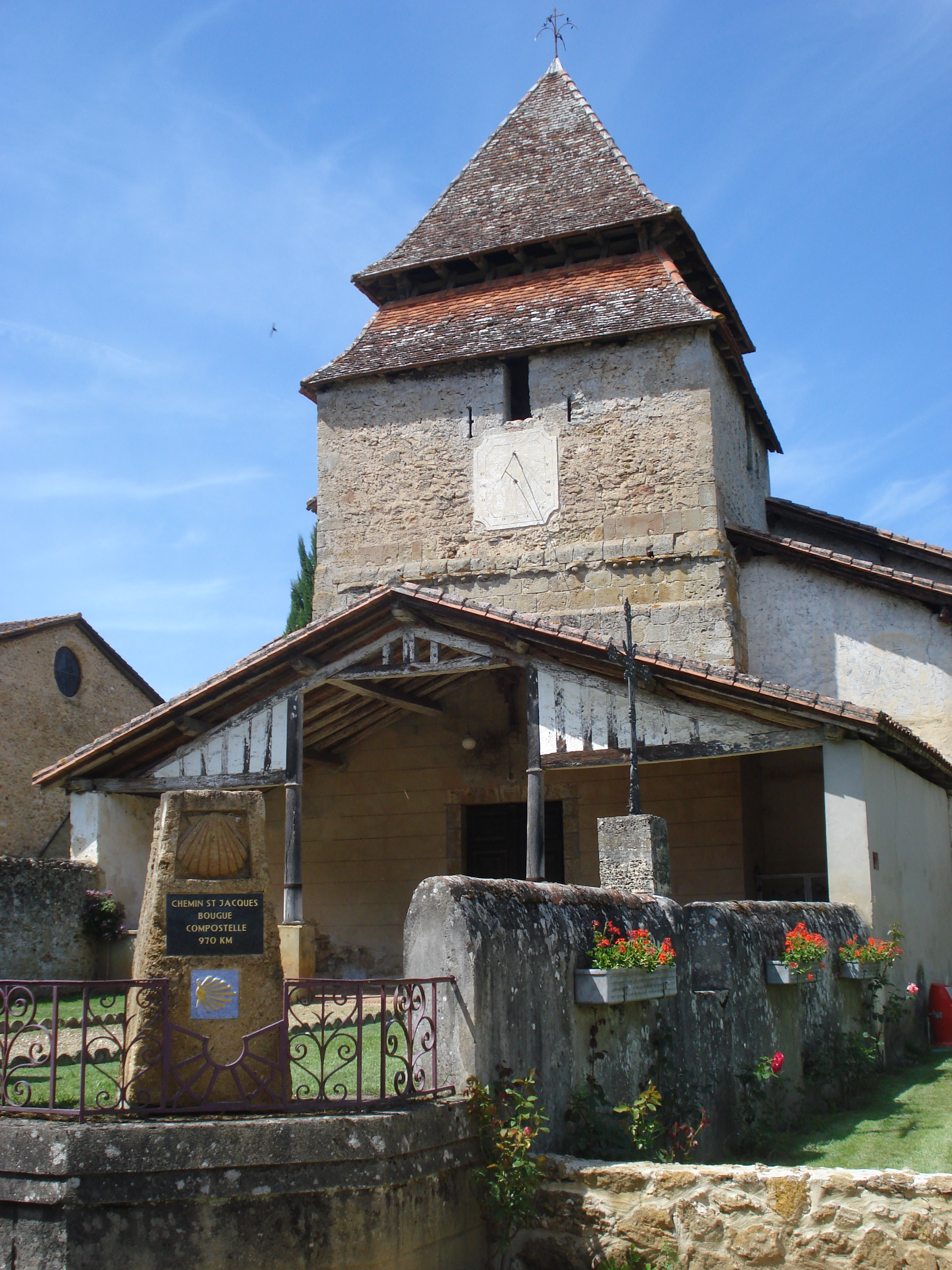 Bougue (Landes), église et balise Compostelle